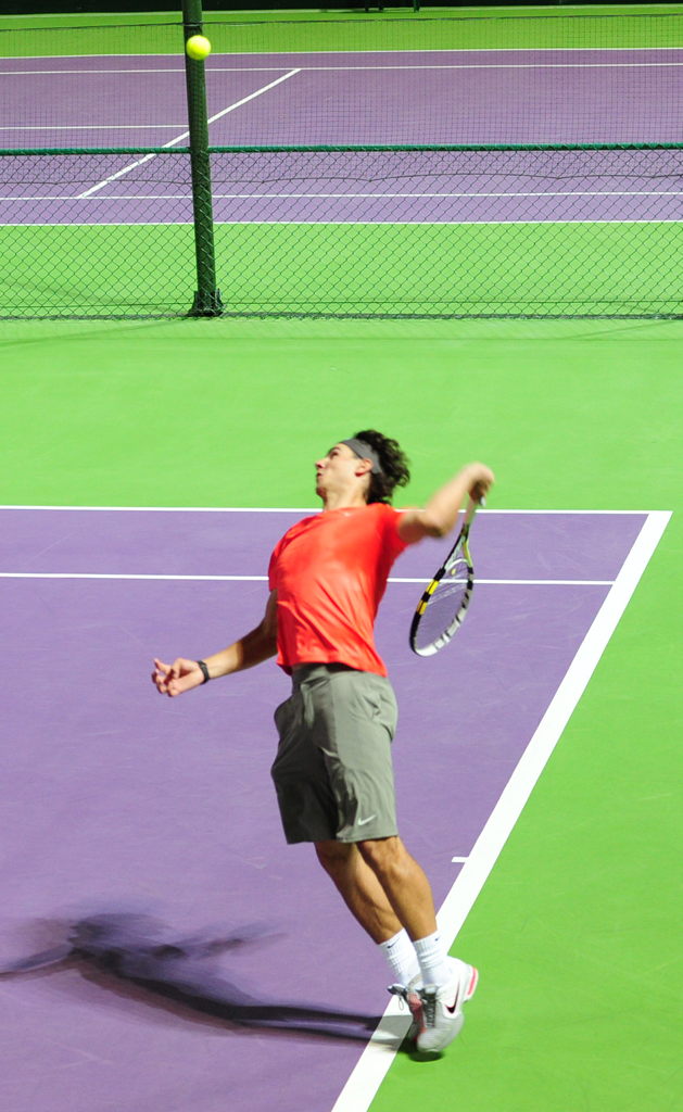 Rafael Nadal